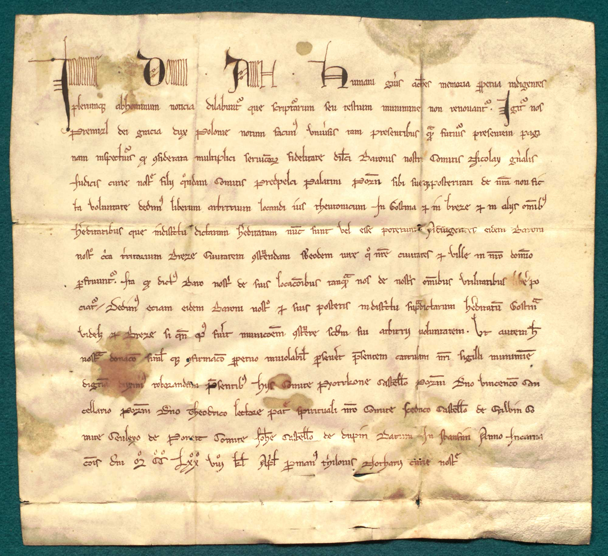 Przemysł II, ks. polski, pozwala Mikołajowi, sędziemu, synowi Przedpełka, woj. poznańskiego, lokować Gostyń i Brzezie na prawie niemieckim. Język: łac. Opis zewnętrzny: oryg., 1 k. pergaminowa, 21,5 x 26 + 1,8 cm; 2 nacięcia po pieczęci